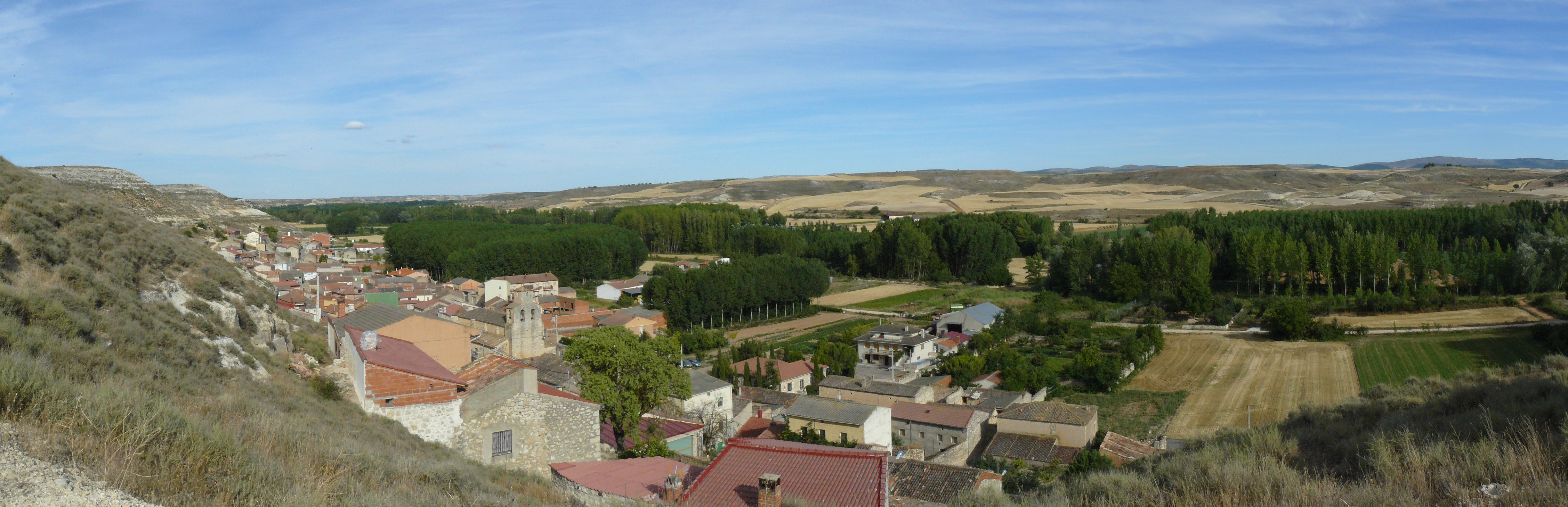 Torregalindo (Burgos).